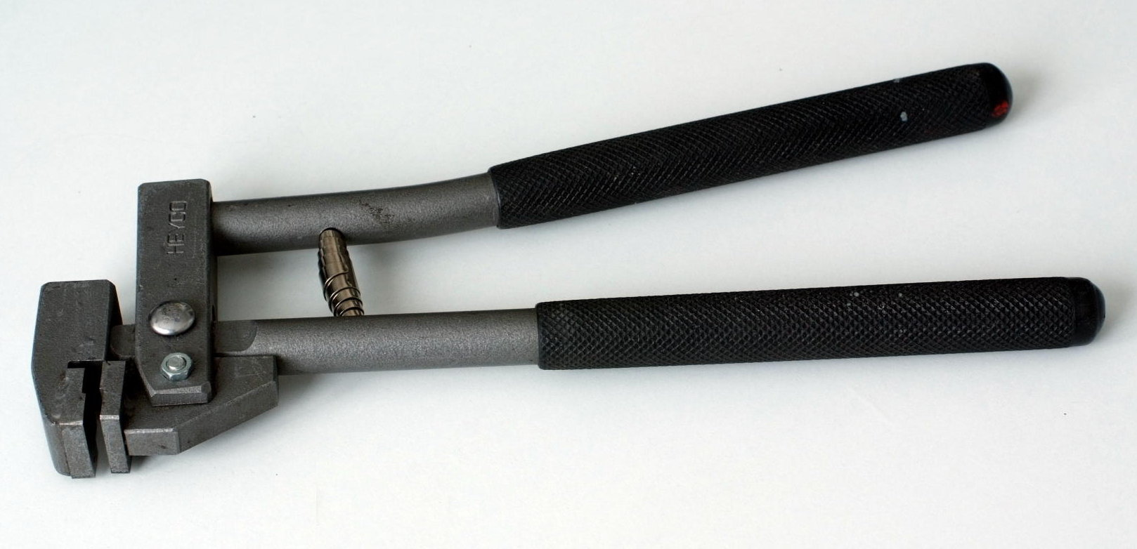 joggling tool